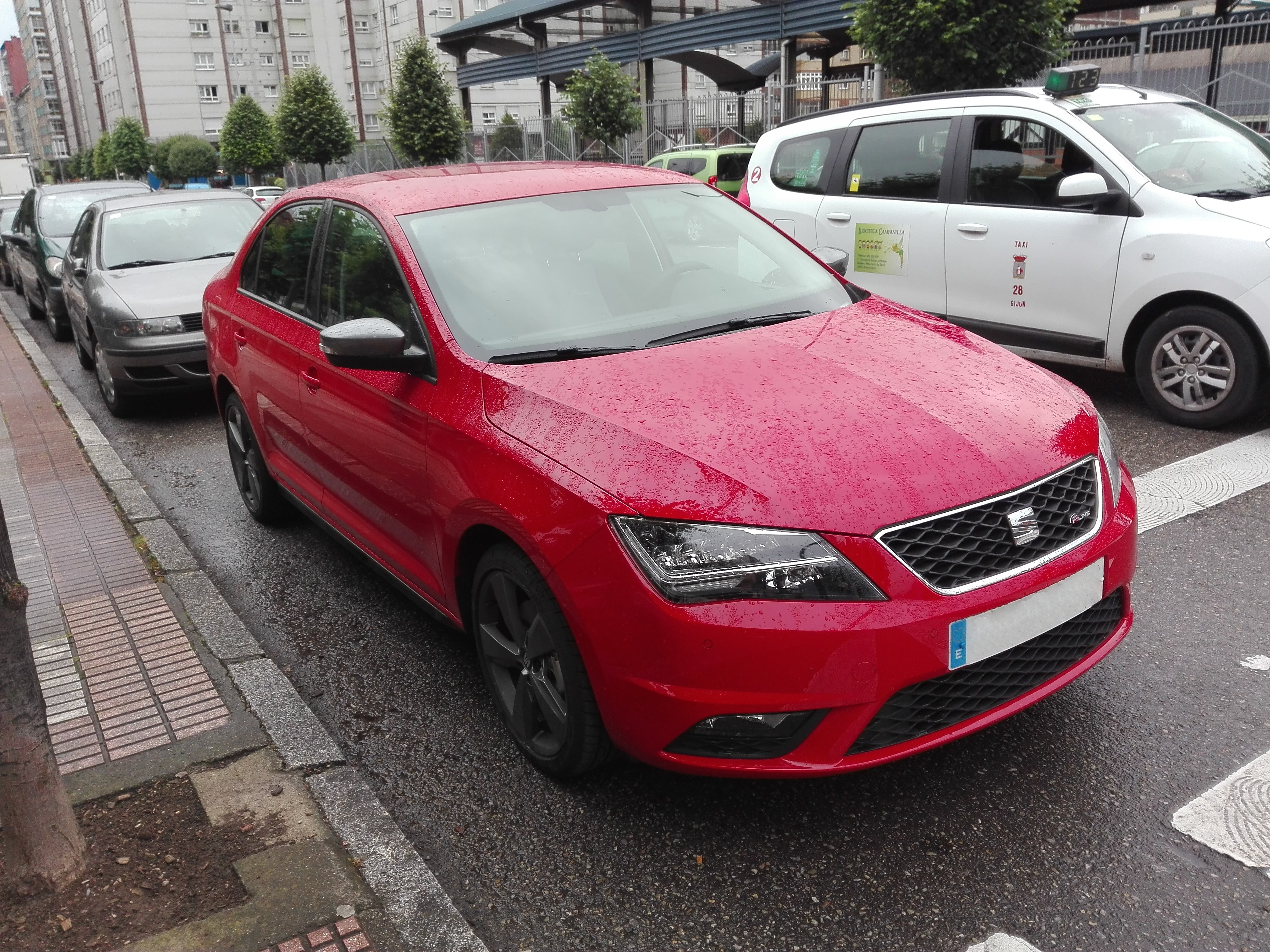 SEAT Toledo IV FR Line 3-4 Front